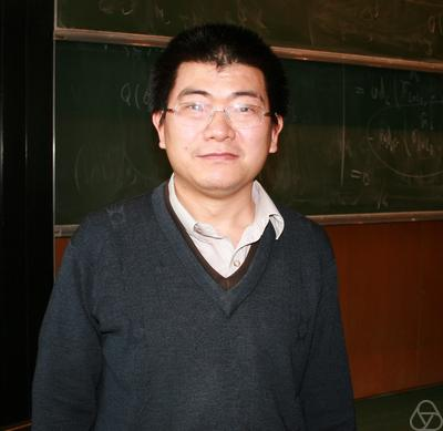 Xiaonan Ma en 2011 à Oberwolfach